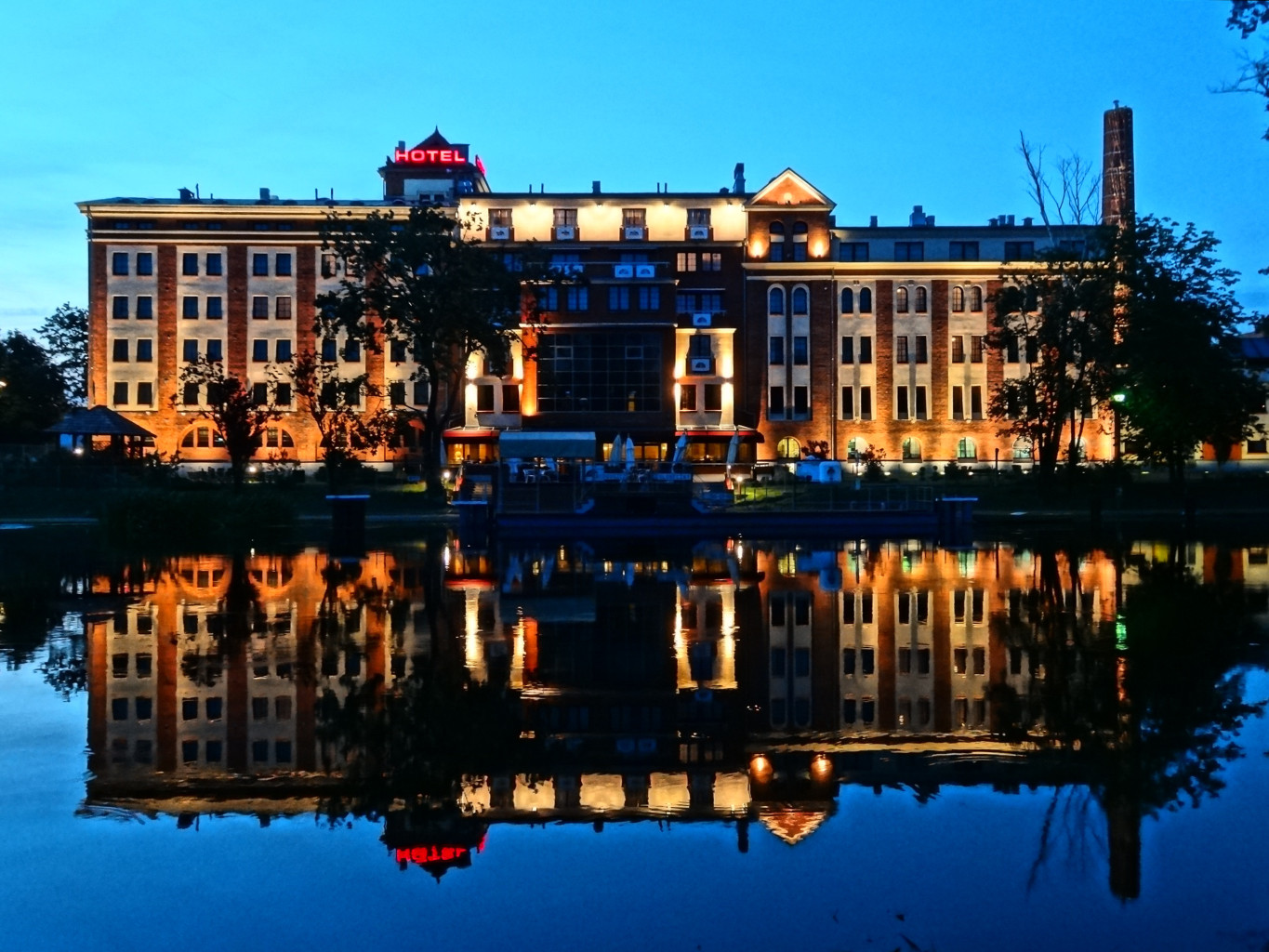 Hotel "Słoneczny Młyn" urządzony w 2006 r. w XIX-wiecznym młynie Kenzera w Bydgoszczy przy ul. Jagiellońskiej